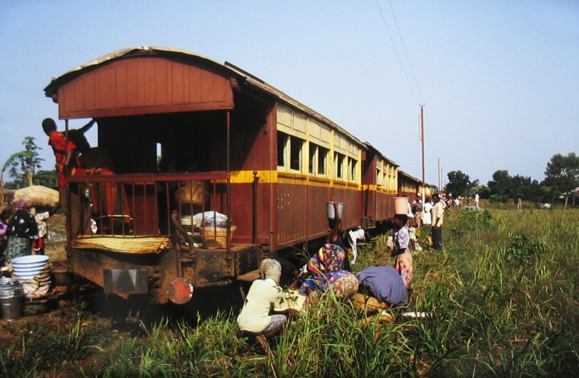 Zug von Lomé nach Kpalimé auf einem Unterwegsbahnhof.